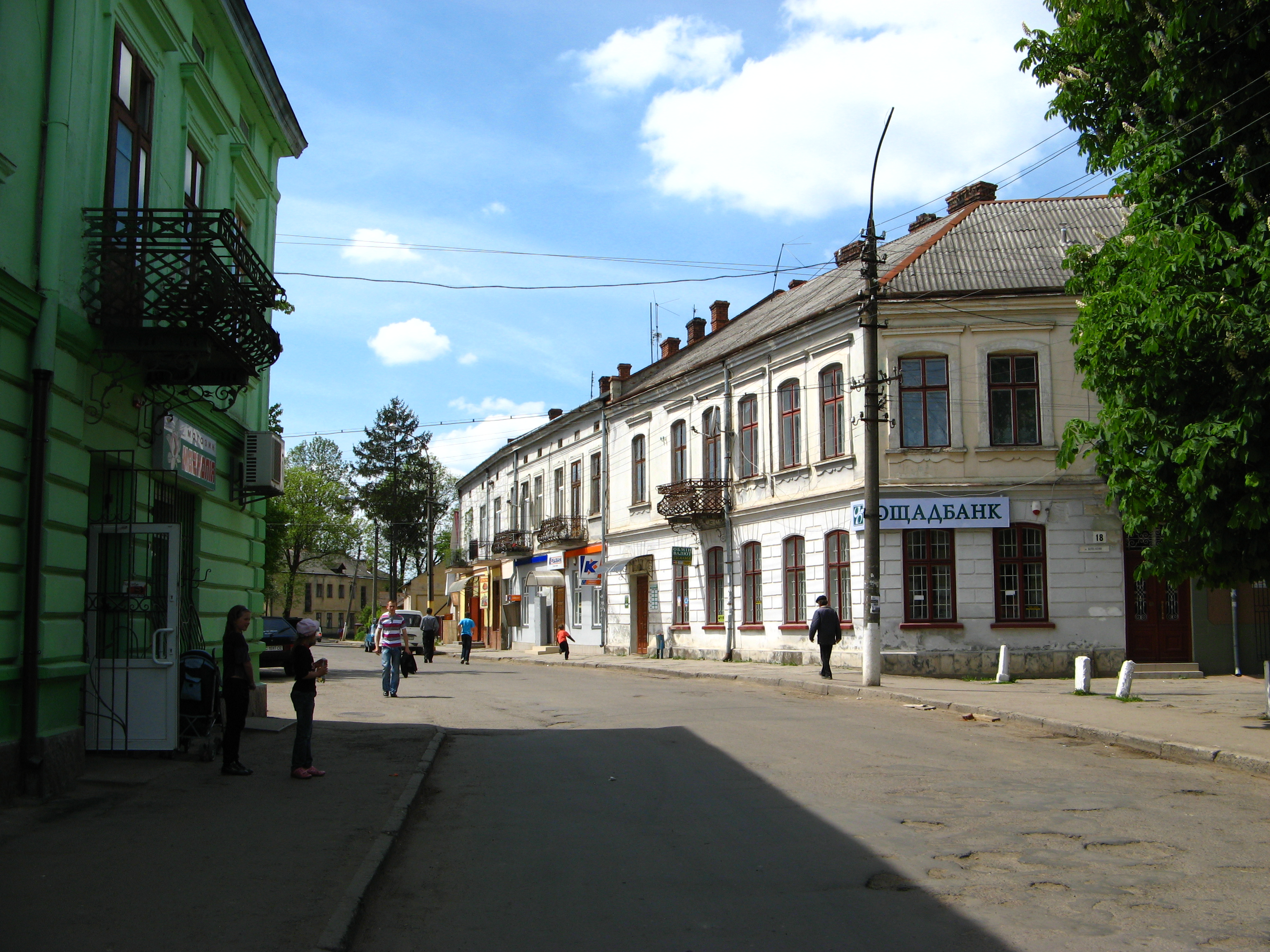 місто Рудки (Львівська область)